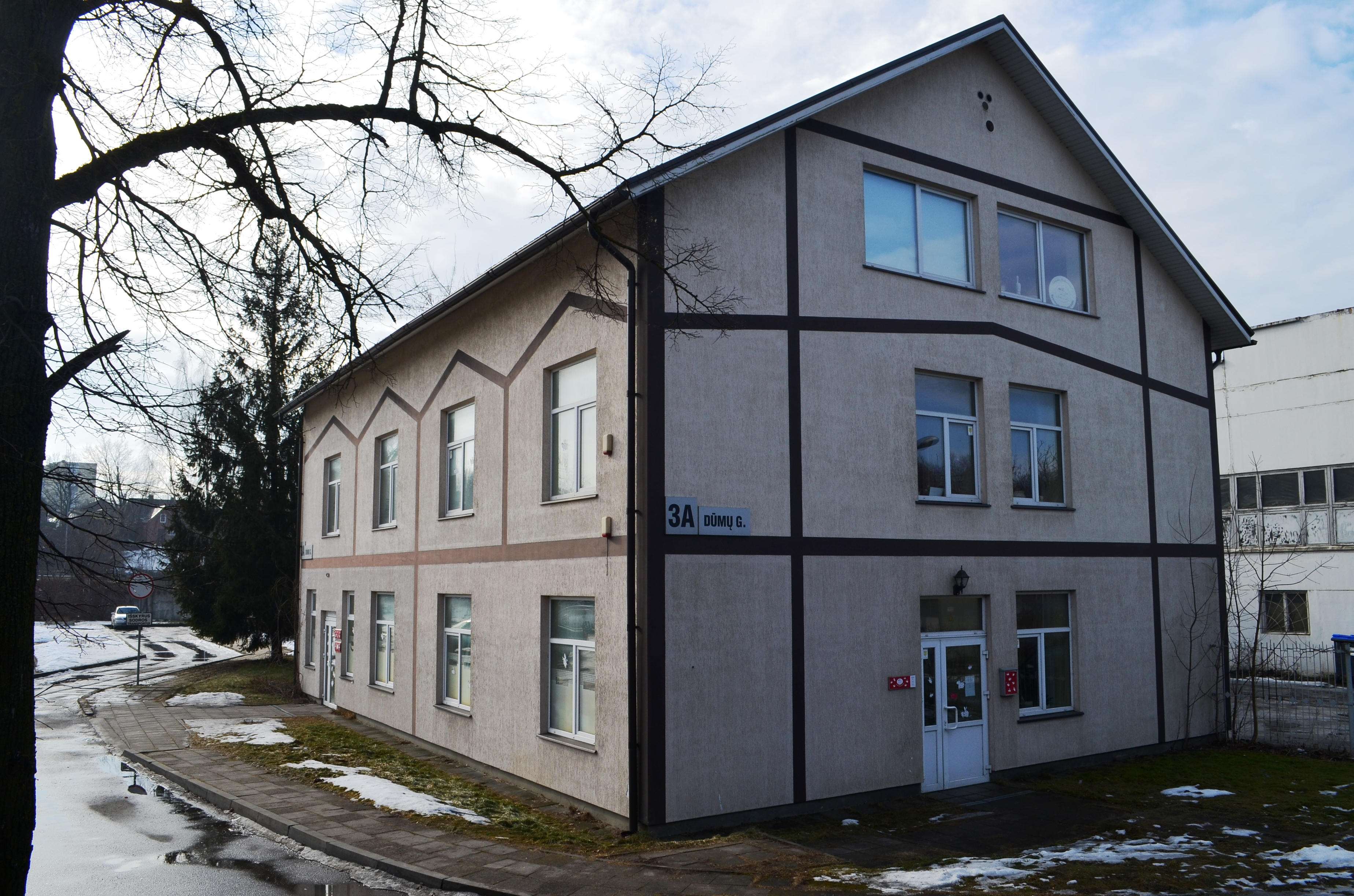 Leidykla "Nieko Rimto", Dūmų g. 3A, N. Vilnia, Vilnius